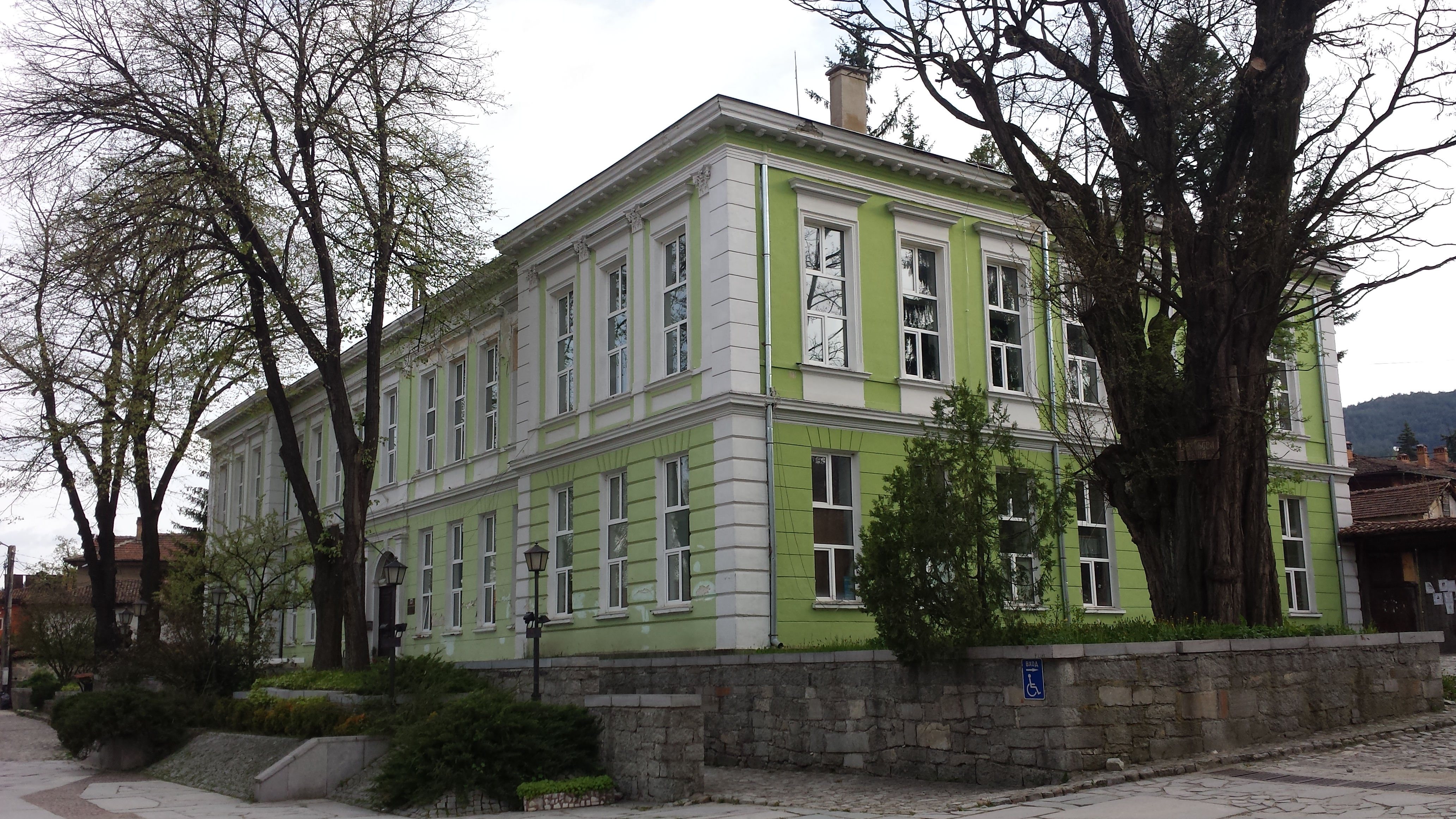 Гимназия Любен Каравелов